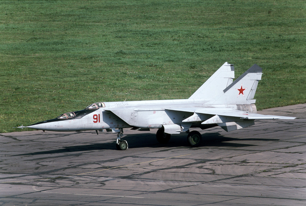 Russian MiG-25U at Zhukovsky in 1995